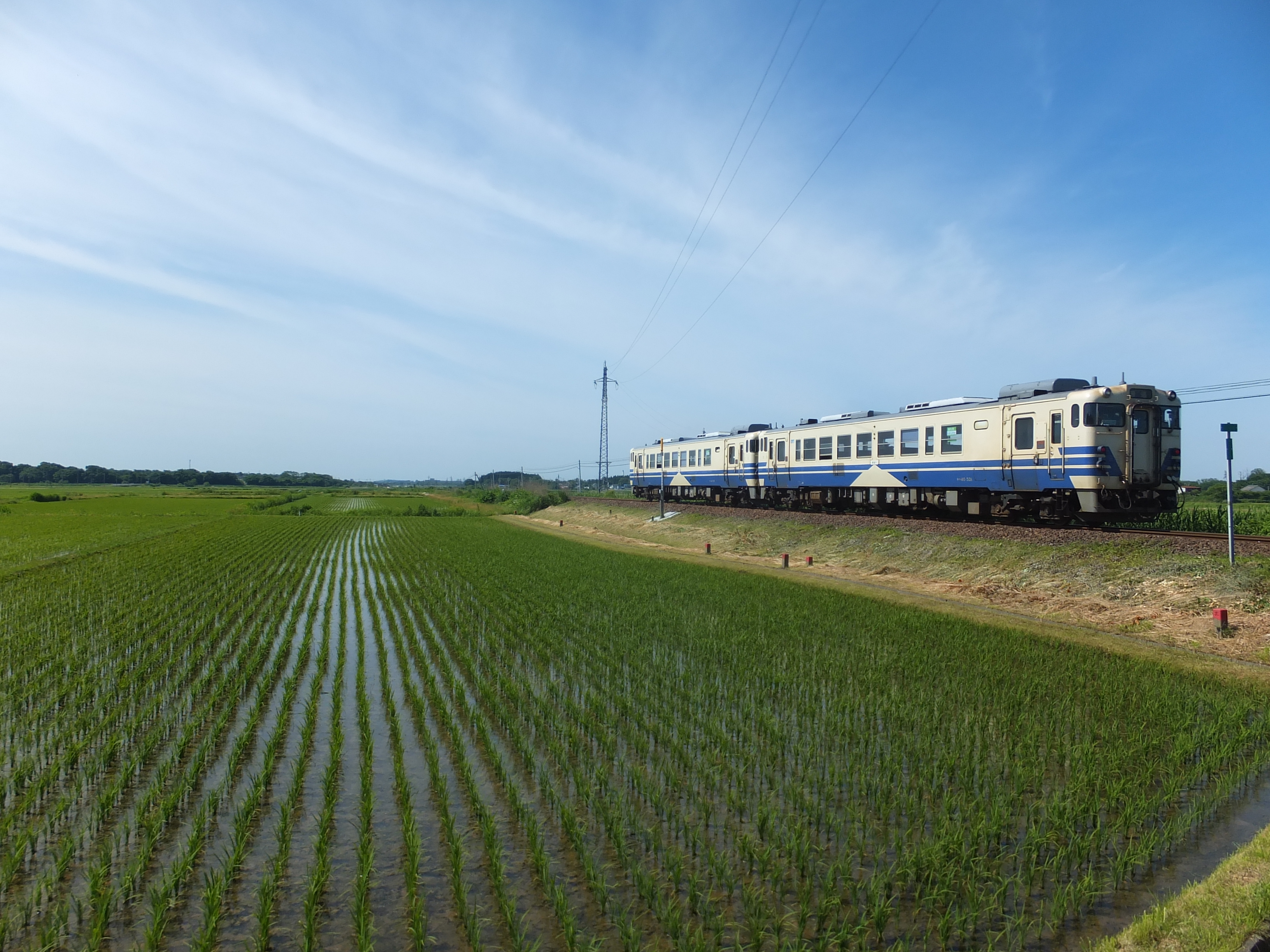 鳥形駅を発車し東能代駅に向かう五能線522D列車